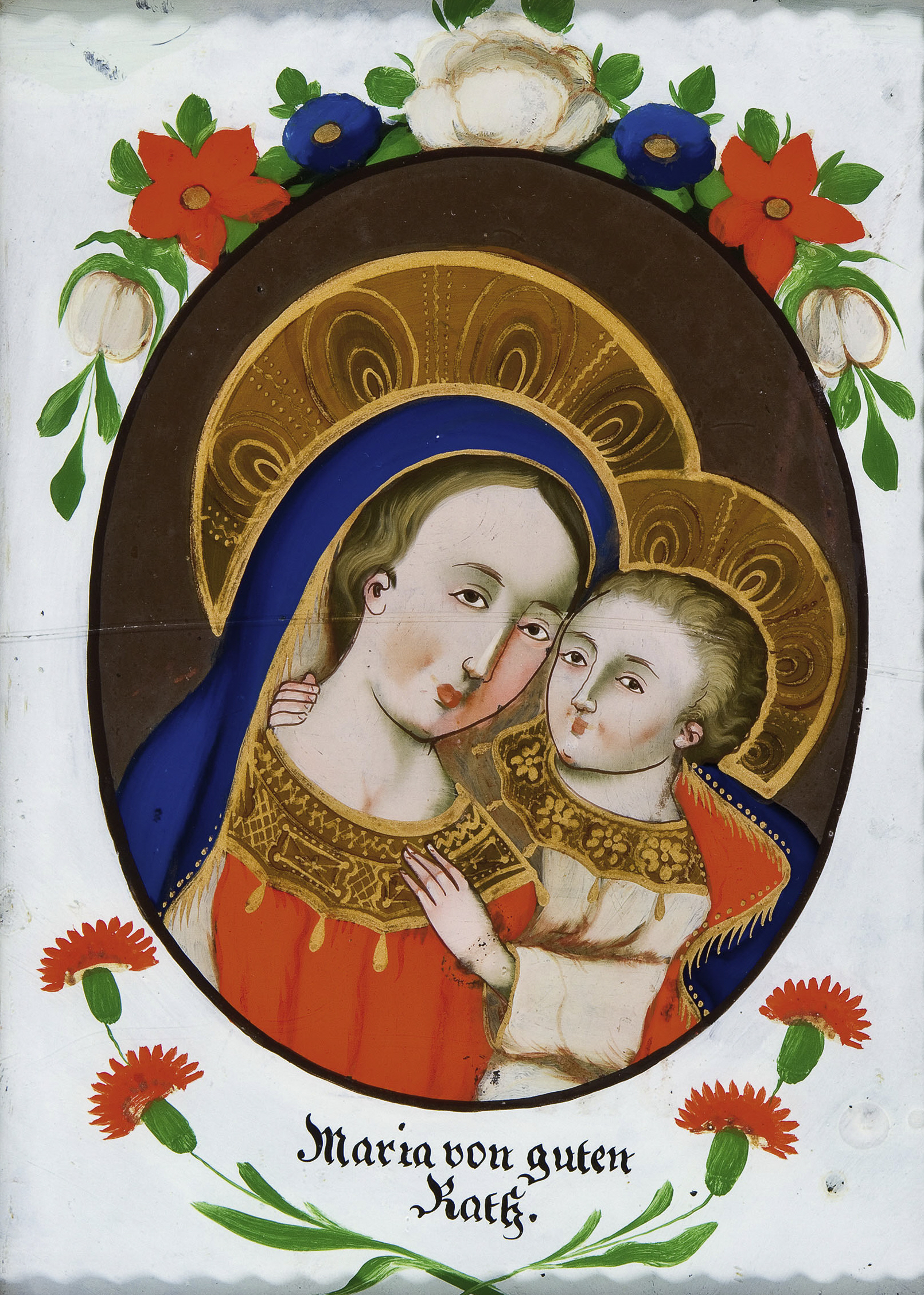 Hinterglasbild Maria vom guten Rat, Werkstatt Gege, Seehausen (Oberbayern), 2. Drittel 19. Jh.